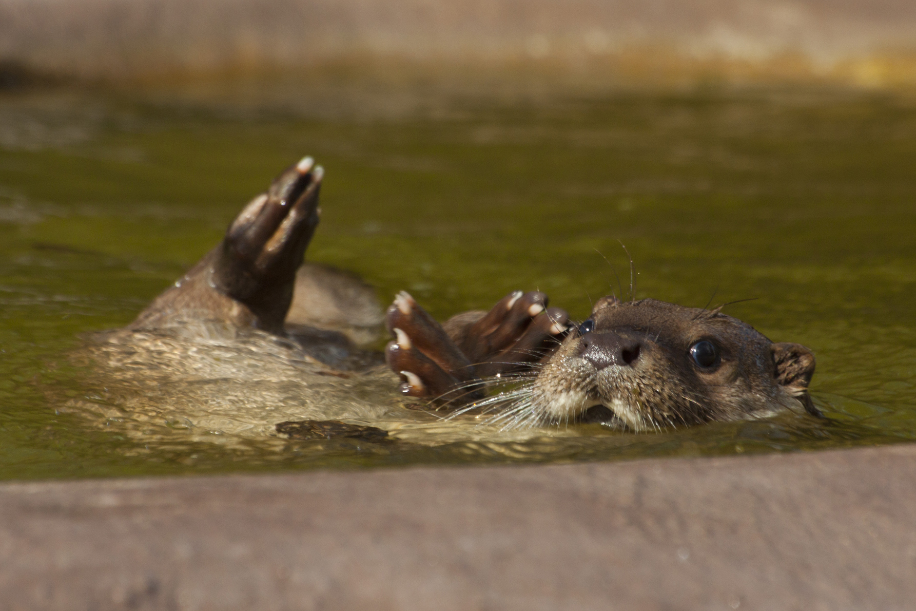 Vydra říční (Lutra lutra) Systém: Řád: ŠELMY /Carnivora/ Čeleď: LASICOVITÍ /Mustelidae/ Handicap: Ochočený jedinec následkem odchovu v zajetí. Charakteristika: Vydra říční je velká lasicovitá šelma s protáhlým, štíhlým tělem, krátkými končetinami s plovacími blánami a svalnatým, zužujícím se ocasem. Má krátkou světle až tmavě hnědou srst s bílou spodinou. Pohlaví se od sebe zbarvením neliší. Rozměry: Délka těla 57 – 80 cm, hmotnost 2 – 6,5 kg. Rozmnožování: Uvnitř území jednoho samce žijí zpravidla dvě samice, které samec v době, kdy jsou připravené k páření, střídavě navštěvuje. Vydří máma rodí ve vyhrabané noře zpravidla 2 – 3 slepá mláďata. V prvních týdnech života jsou mláďata plně závislá na mateřském mléku. Mláďata se začínají osamostatňovat kolem 8 – 9 měsíce života. Potrava: Vydra se živí hlavně rybami. Nepohrdne ani rakem, žábou či vodním ptákem. Loví často staré a nemocné jedince a tím eliminuje šíření různých nemocí. Početnost a výskyt v ČR: U nás byla hojná do počátku 20. století. Poté však byla následkem lovu téměř vyhubena. Nyní její početní stavy díky ochraně opět vzrůstají a z oblasti Jižních Čech, Českomoravské Vrchoviny, severozápadních Čech, Poodří a dalších lokalit se postupně šíří na celé území.